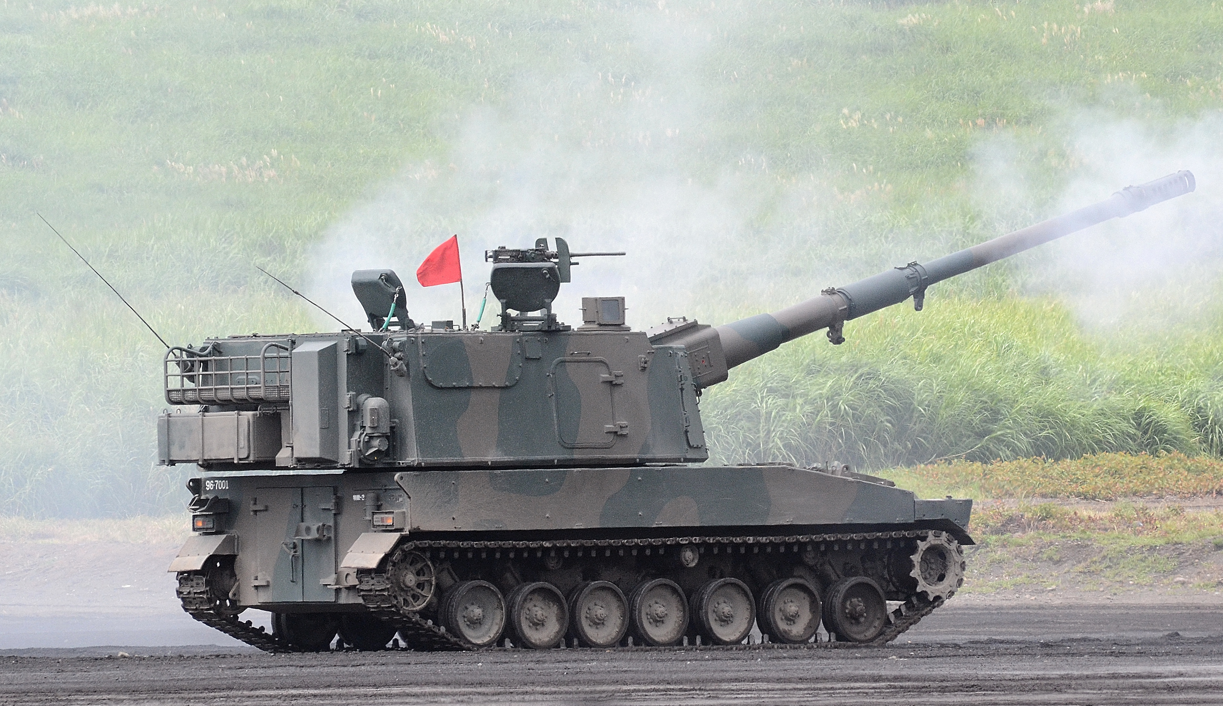 射撃中の陸上自衛隊の99式自走りゅう弾砲（2015年の東富士演習場で行われた富士総合火力演習において撮影）